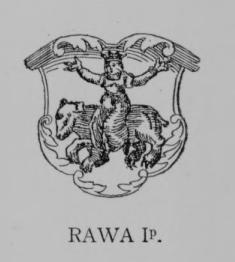 Rawicz Ip